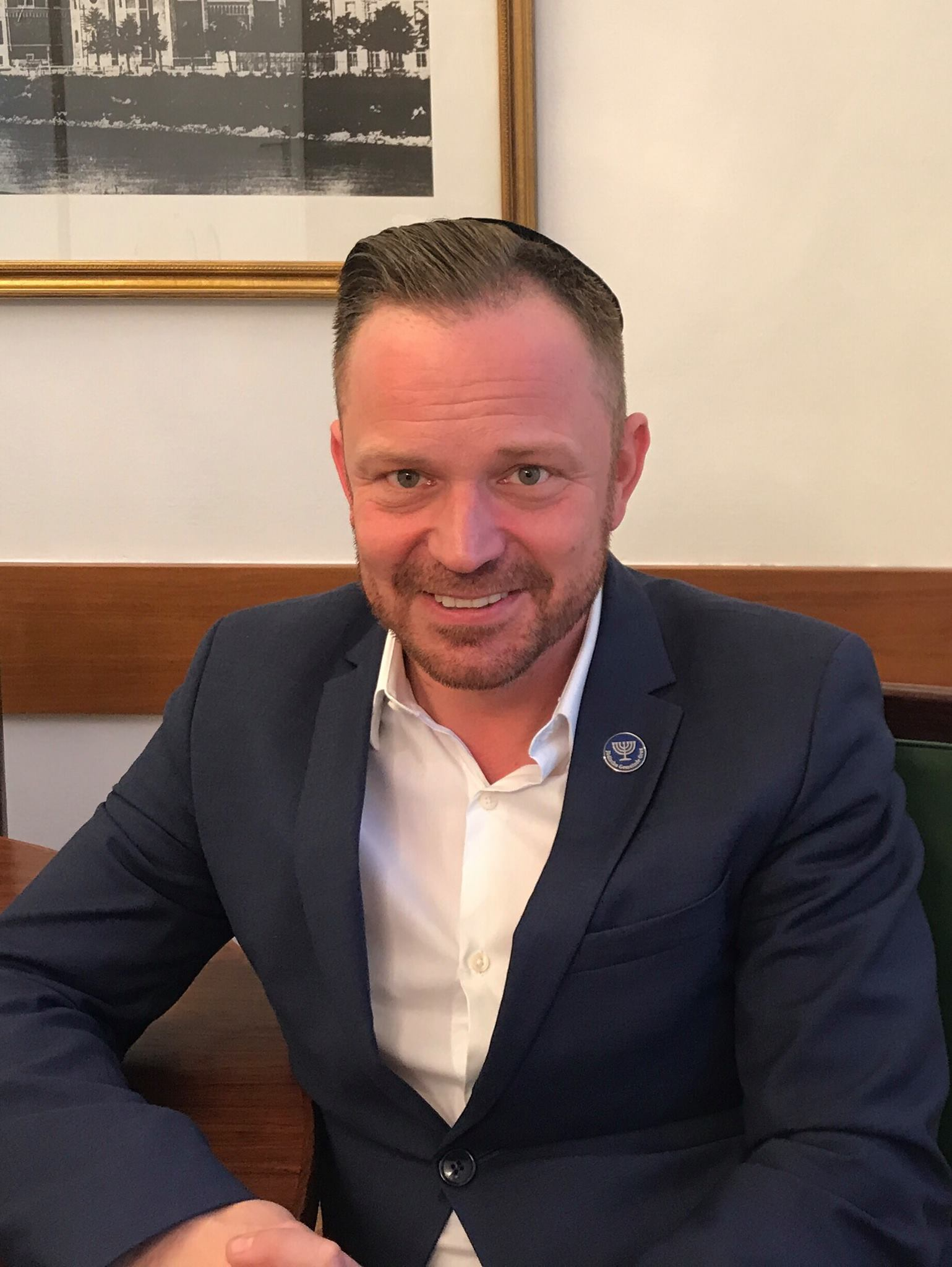 Präsident Elie ROSEN an seinem Amtssitz in Graz